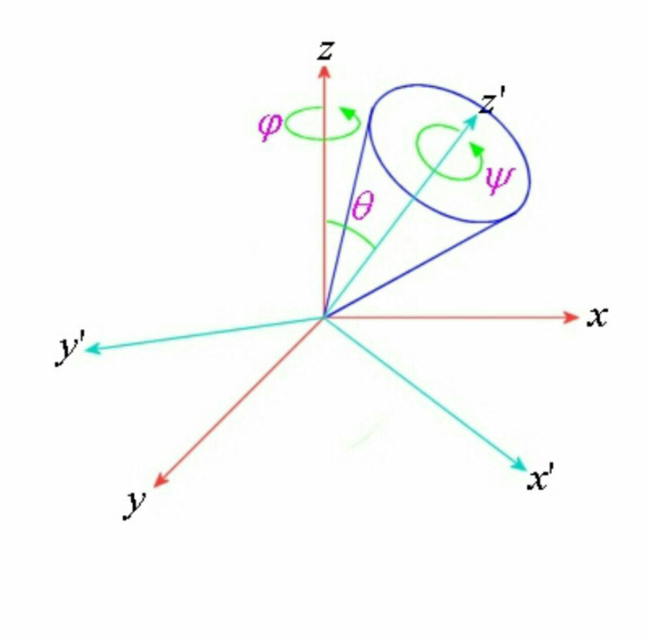 ניתוח סביבון הנע במערכת אינרציאלית באמצעות מערכת צירים ראשית